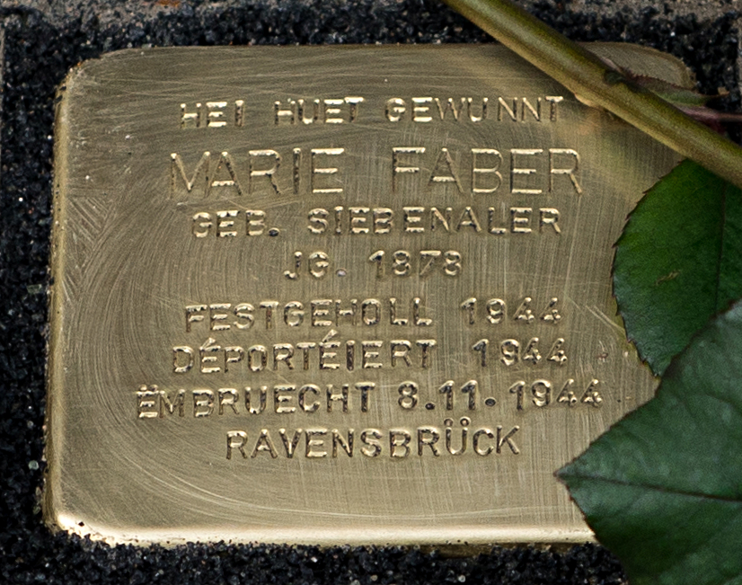 Als ofschléissend Aktioun am Kader vu "Mémoires communes - verfollegt, verdrängt, vergiess" huet d'Gemeng Munneref de 6. November 2015 eelef Stolpersteng vum däitsche Kënschtler Gunter Demnig verleeë gelooss. 18 Lokalassociatiounen hunn de Parrainage iwwerholl. D'Marie Si(e)benaler, gebuer den 12. Januar 1878 zu Elleng huet mat hirem Mann, dem Jean-Mathias Faber, op Nr 16 am Millewee zu Munneref gewunnt. Am Krich huet d'Famill d'Refractairen ënnerstëtzt. Op eng Denonciatioun vun der Frëndin vun hirem Jong hi gouf si, a fënnef aner Resistenzler, 1944 vun der Gestapo verhaft an an de Prisong am Gronn agespaart. Vun do koum si iwwer verschidden aner Lager an d'KZ Ravensbrück, wou si den 8. November 1944 gestuerwen ass. Si gouf posthum mam Ordre de la Résistance ausgezeechent.